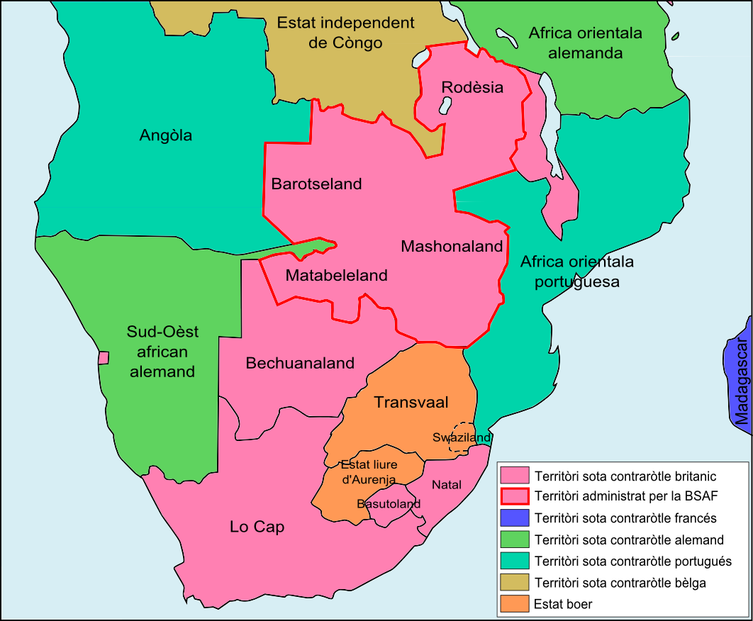 Colonizacion de l'Africa Australa vèrs 1898.